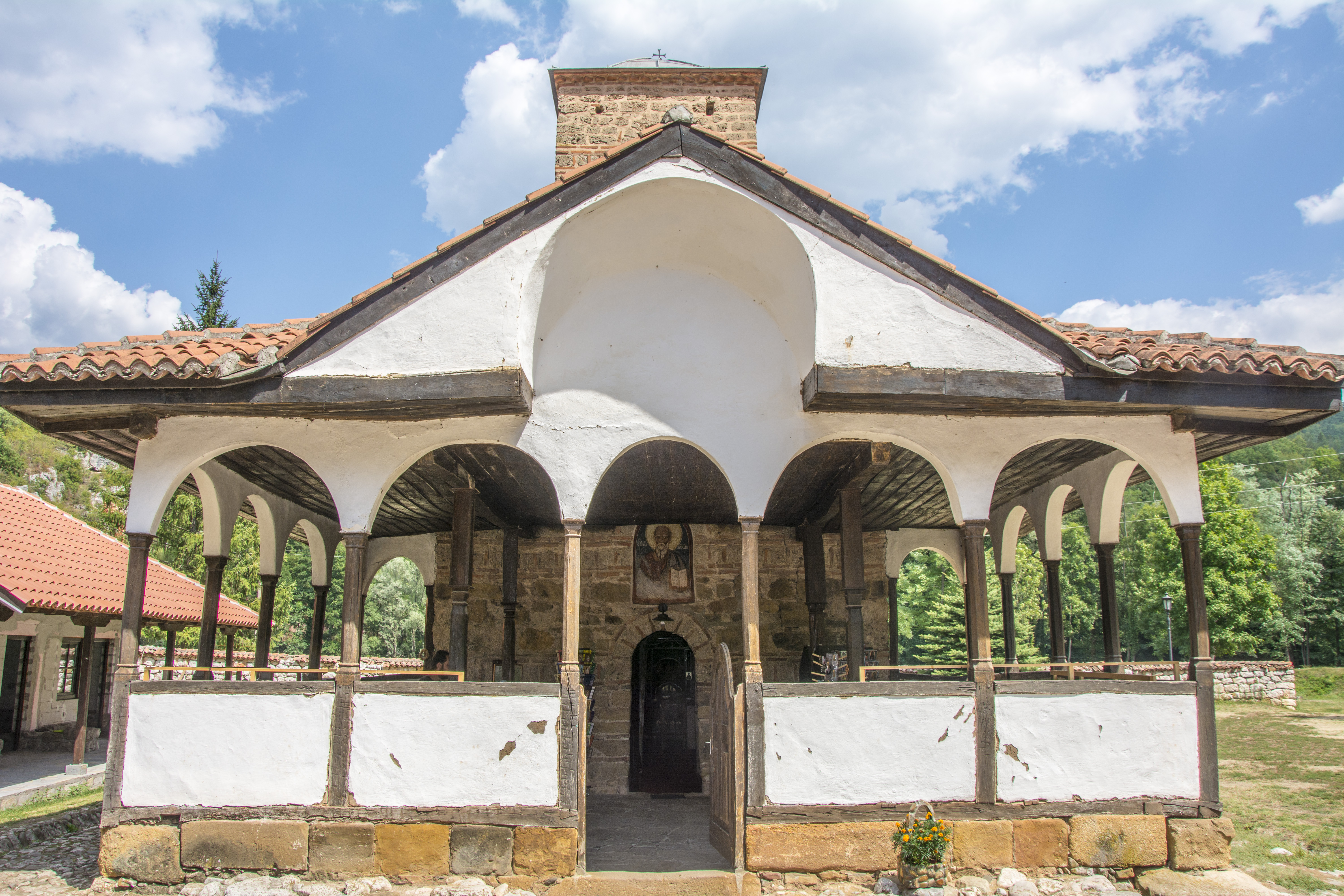 Poganovo manastir